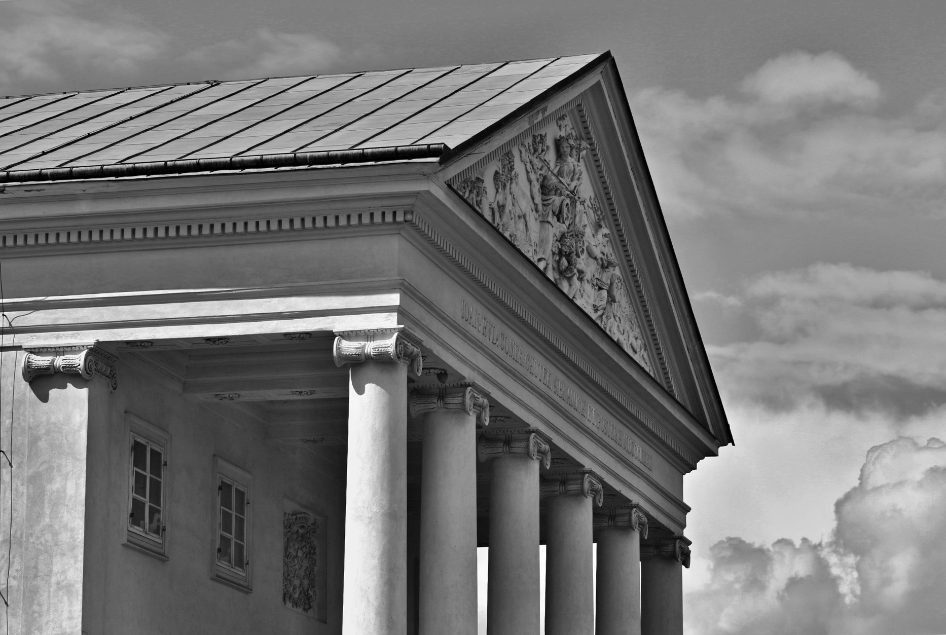 Zámek Kačina